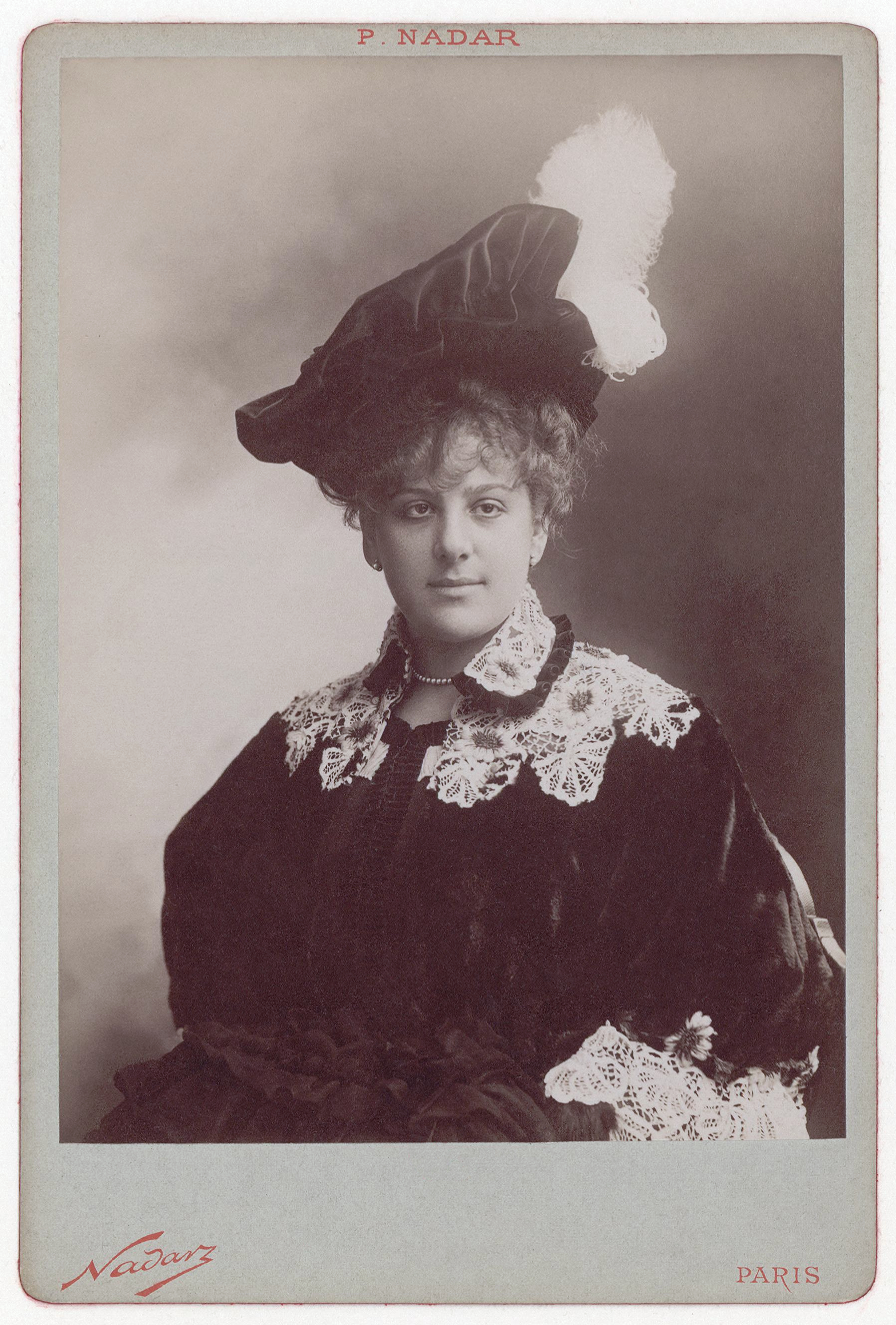 Photograph of Lucy Arbell, mezzo-soprano opera singer. Carte de visite mount.